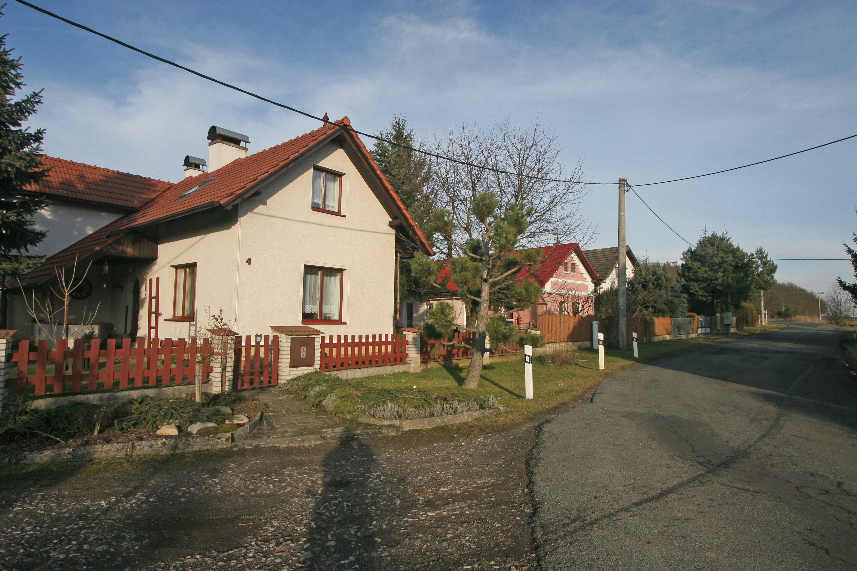 Kouty čp. 4 a 8